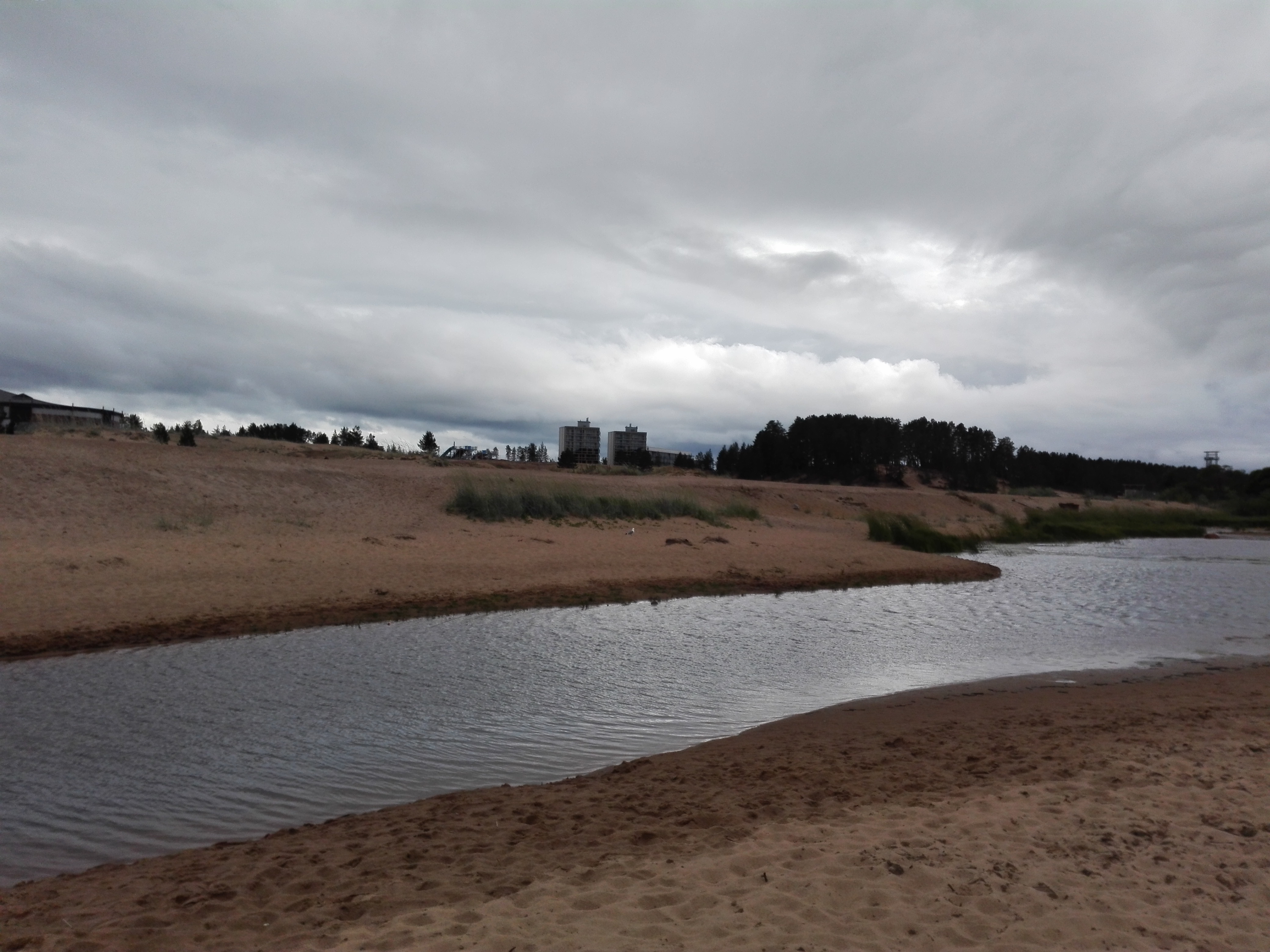 Valokuva Kalajoen hiekkasärkiltä heinäkuulta 2017. Kuvassa muu muassa herrainpakka ja taaempana harjulla loma-asuntoja.